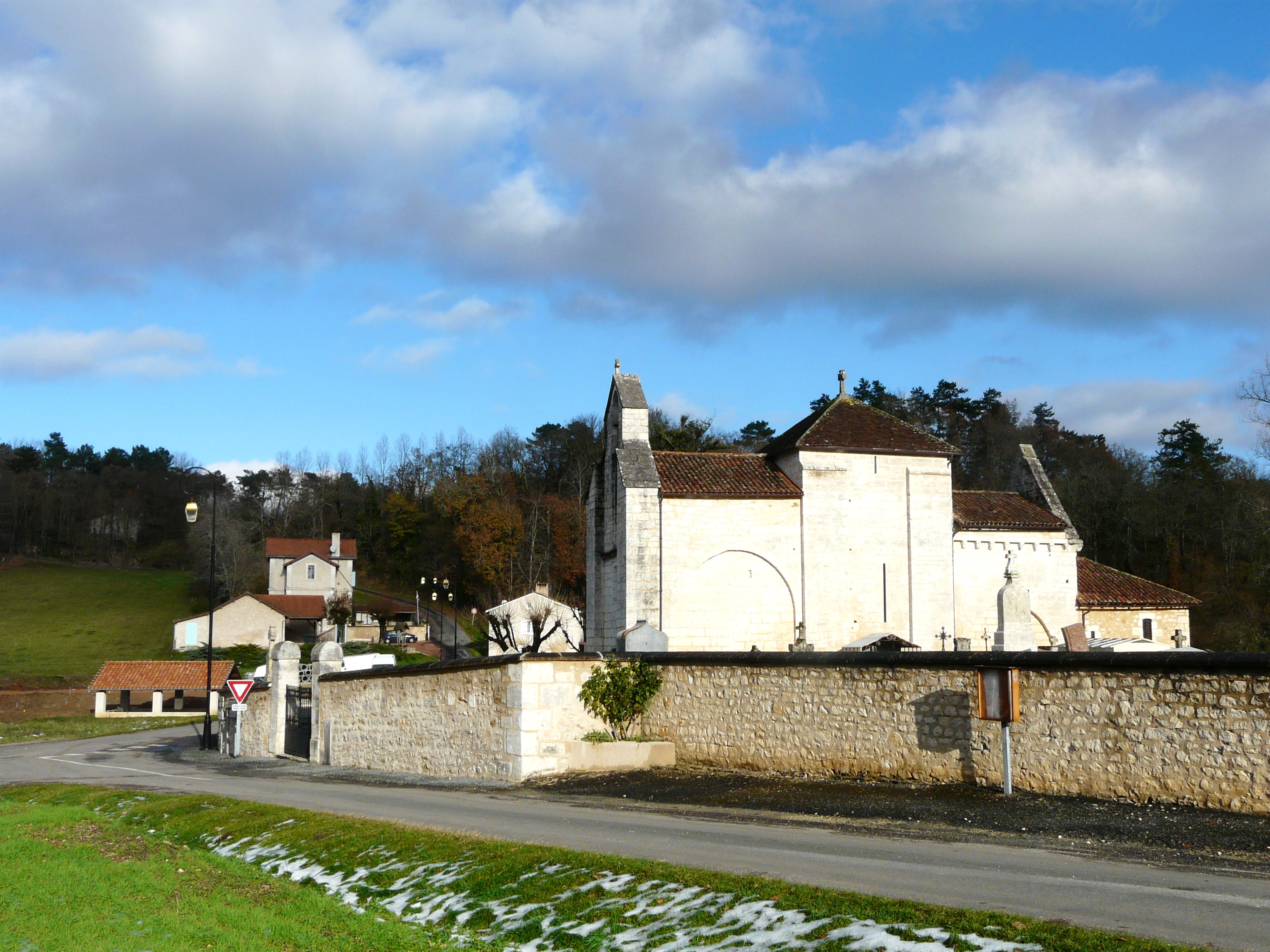 Le village de Lempzours, Dordogne, France.